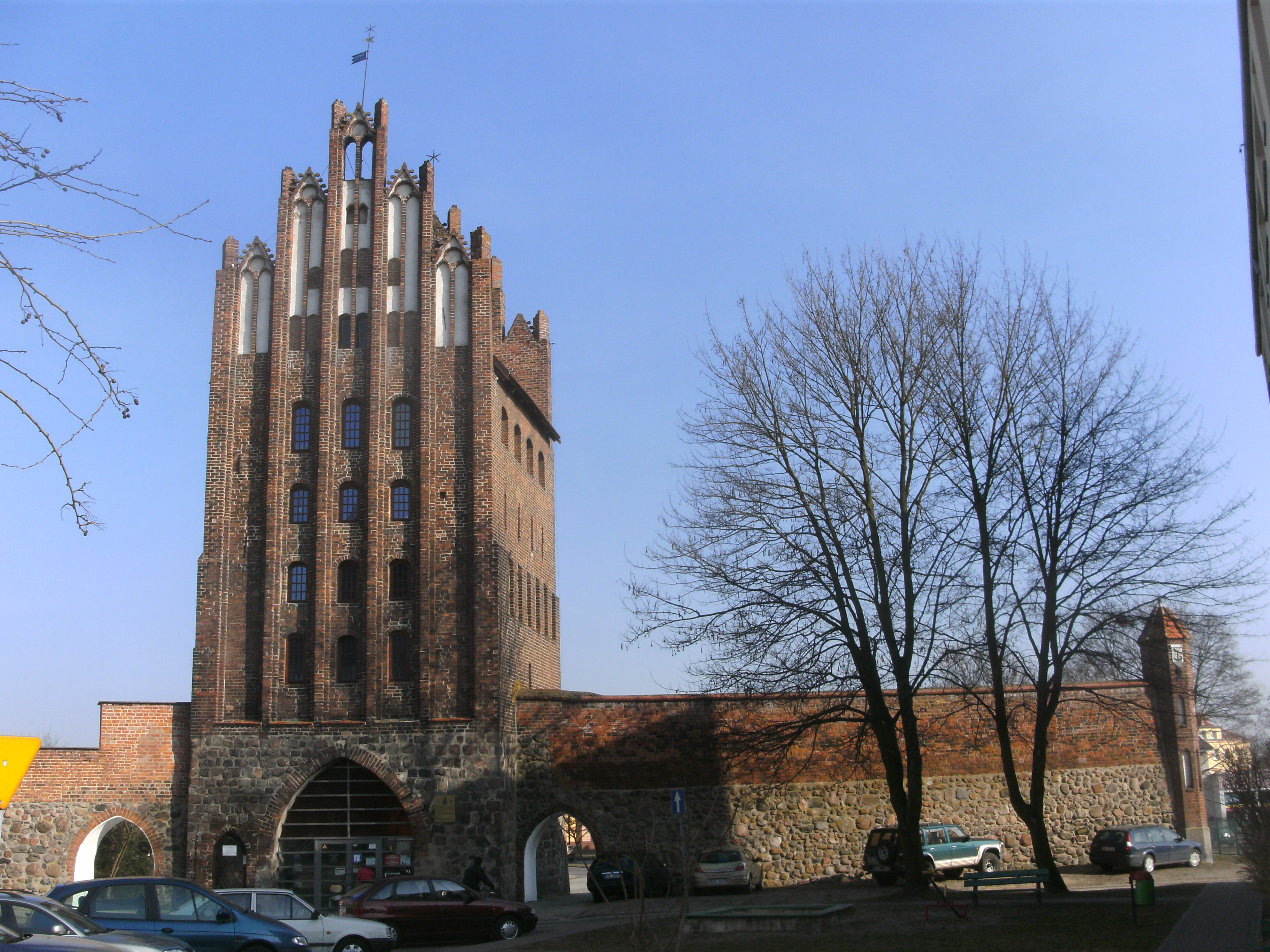 Brama Wolińska w Goleniowie